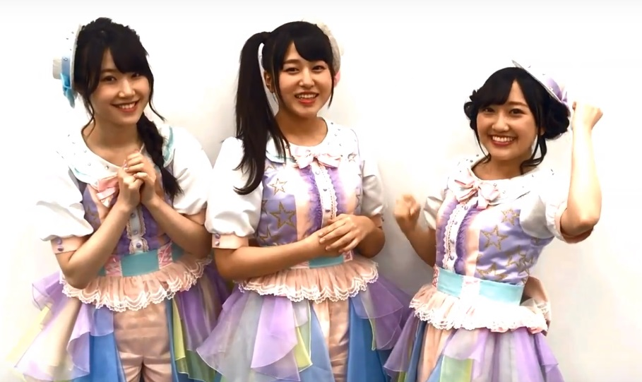 Run Girls, Run!（林鼓子、森嶋優花、厚木那奈美）